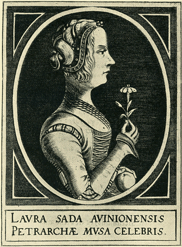 PORTRET VAN LAURA.Portrait de Laure de Noves, ou Laure de Sade. Uit: Tomasini, Petrarcha redivivus (zie p. 193).